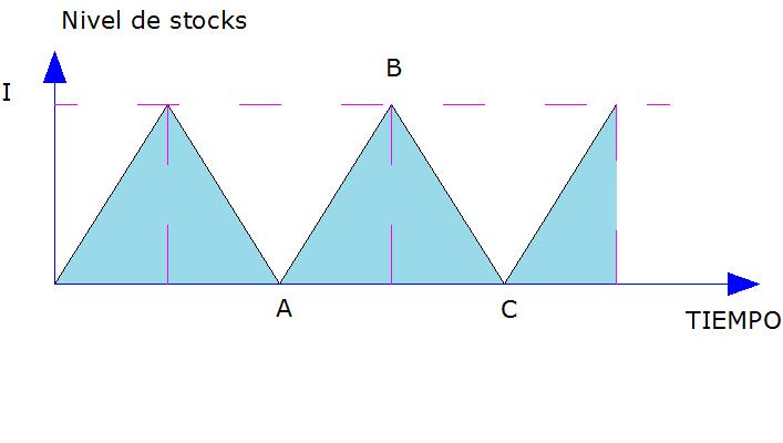 Grafico sobre la evolución del nivel de stocks respecto al tiempo en el caso de producción y consumos simultaneos.